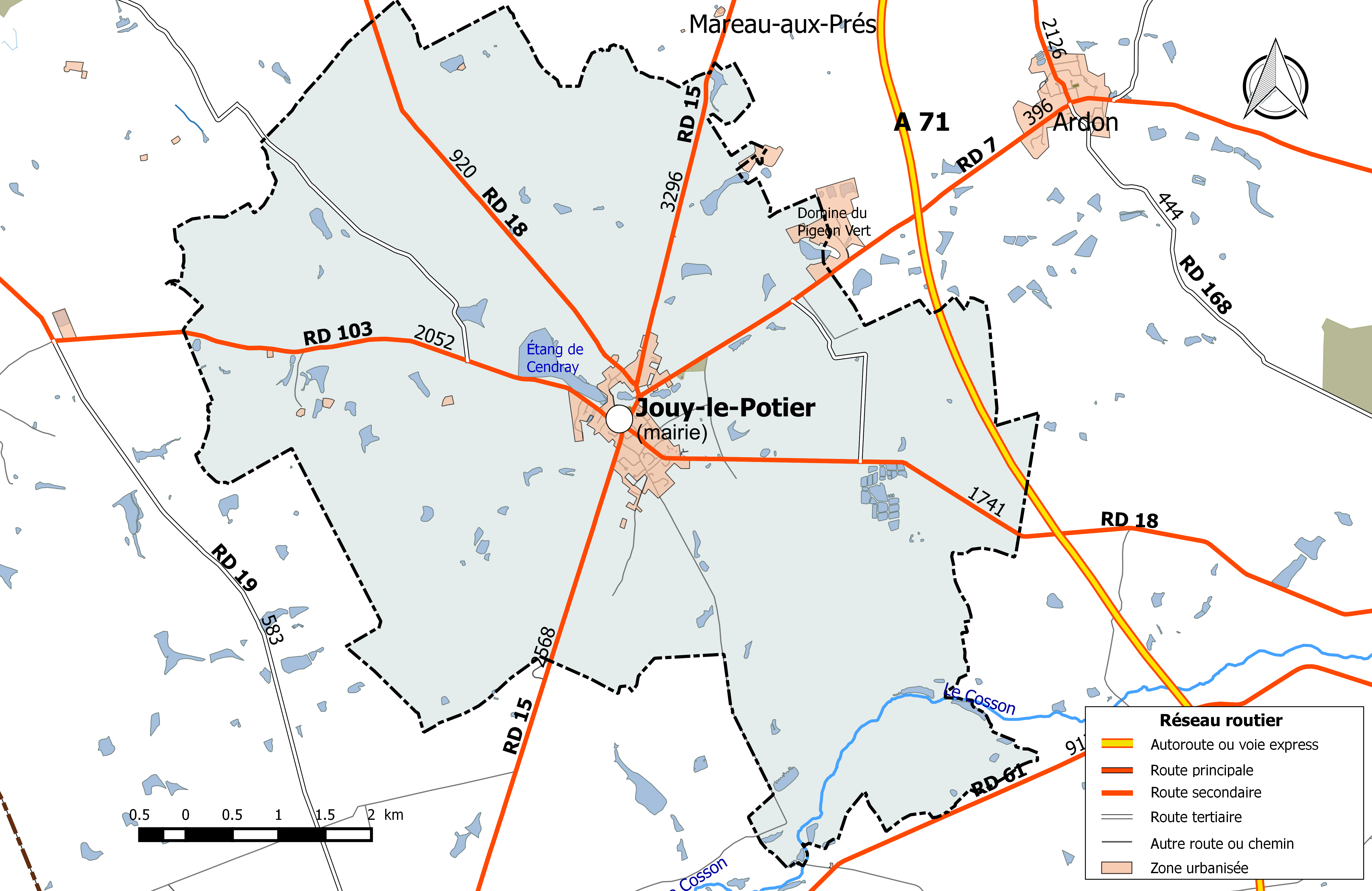 Carte du réseau routier de la commune de Jouy-le-Potier.